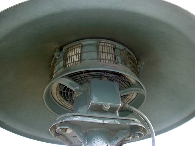 mechanische Sirene von innen